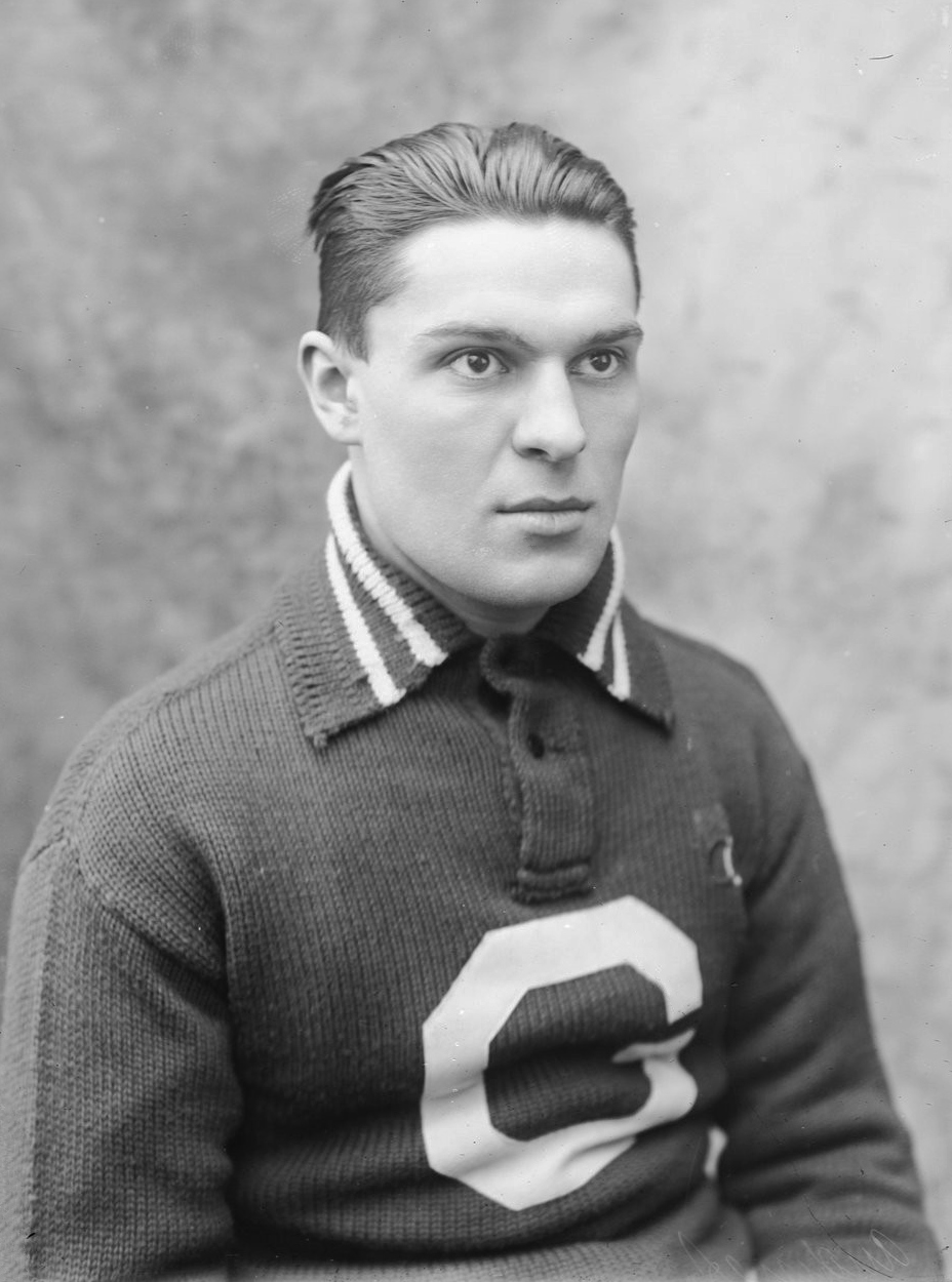 [Portrait du coureur André] Audinet : [photographie de presse] / [Agence Rol]